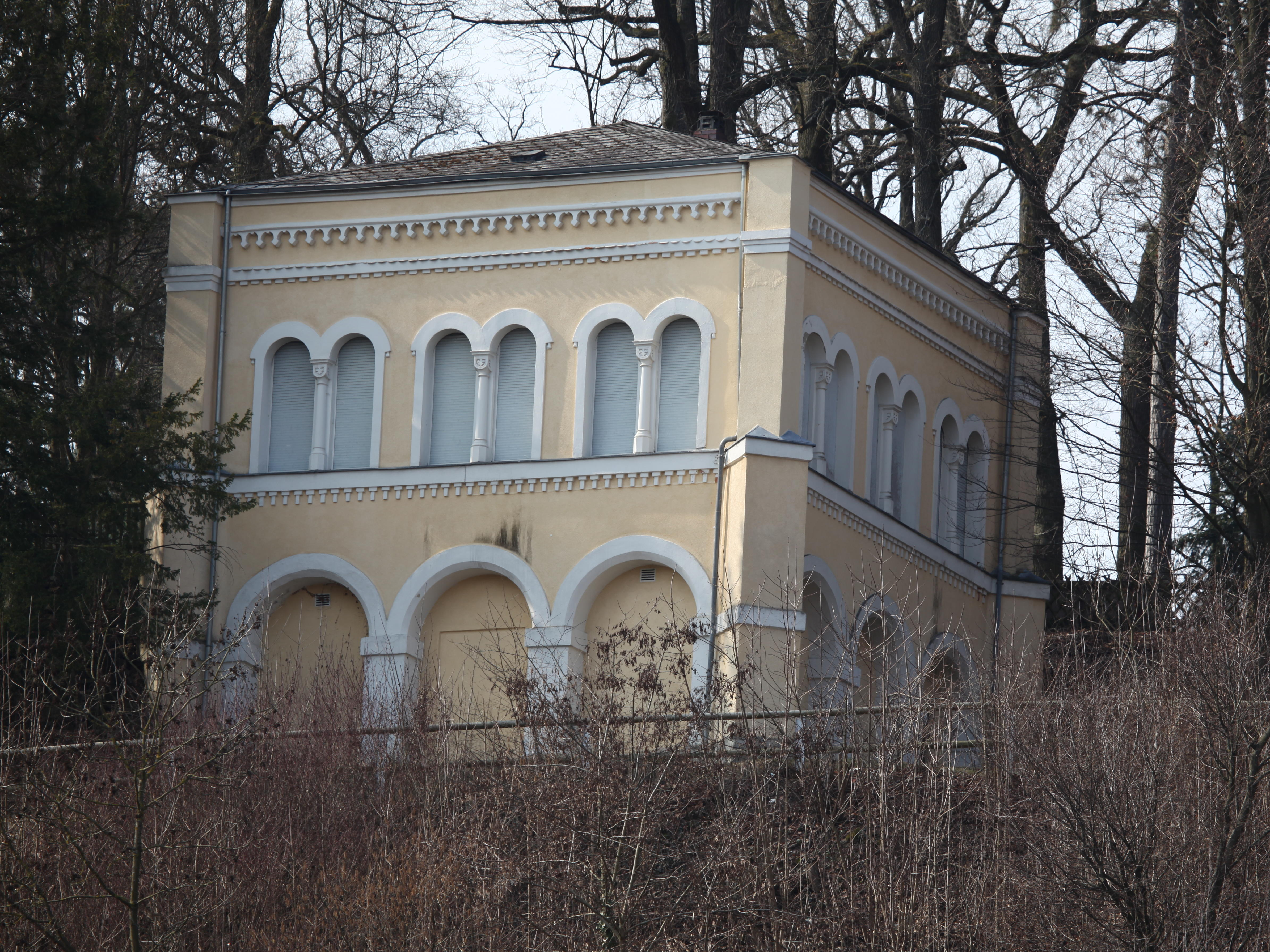 Schnürs Pavillon, Adamiberg 20 in Coburg